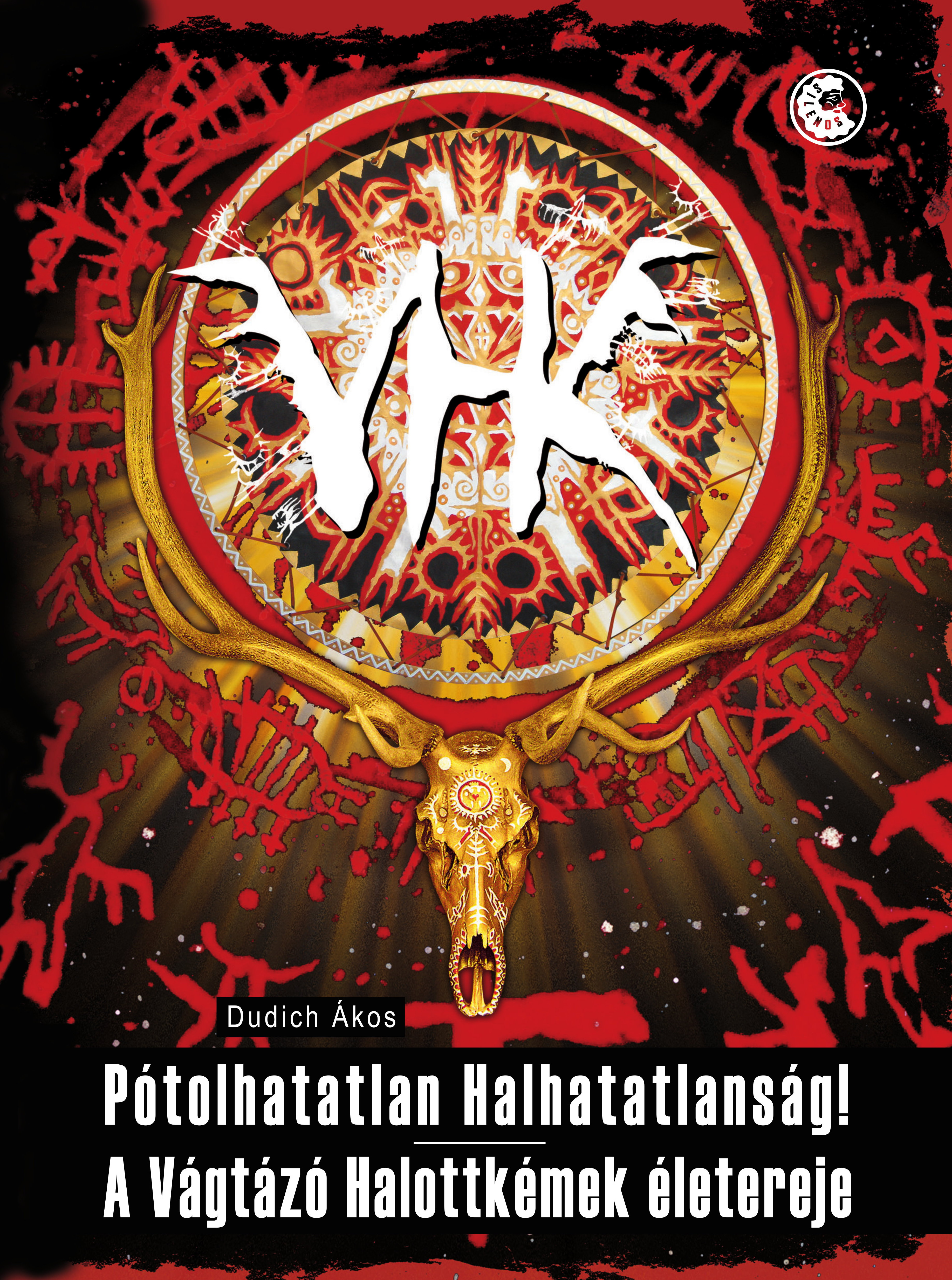 Dudich Ákos: Pótolhatatlan Halhatatlanság! / A Vágtázó Halottkémek életereje. Budapest.